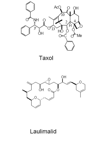 Taxol szerkezet